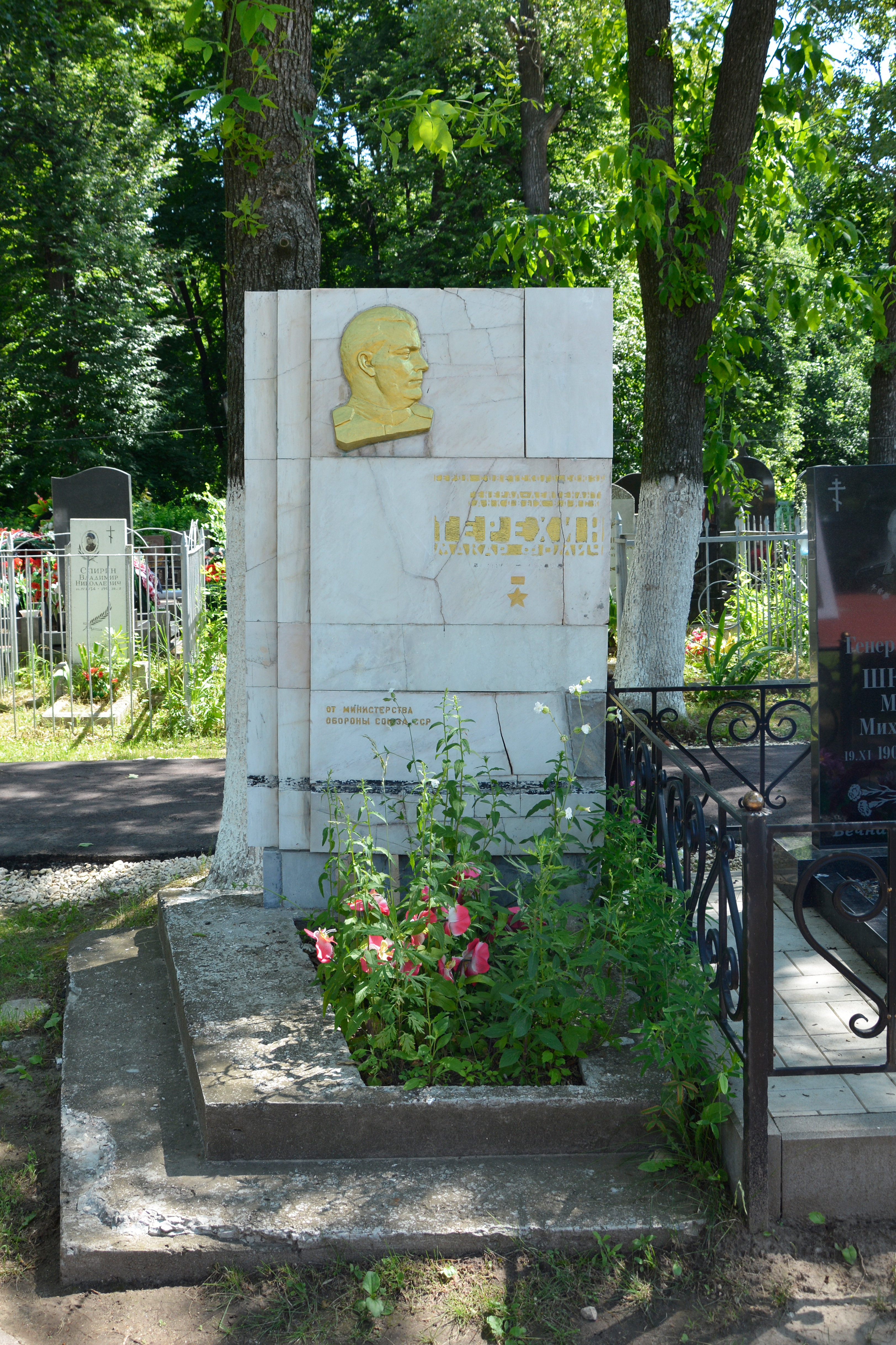 Могила Героя Советского Союза, генерал-лейтенанта танковых войск Терёхина Макара Фомича на Скорбященском кладбище г. Рязани. 25 июня 2020 г.